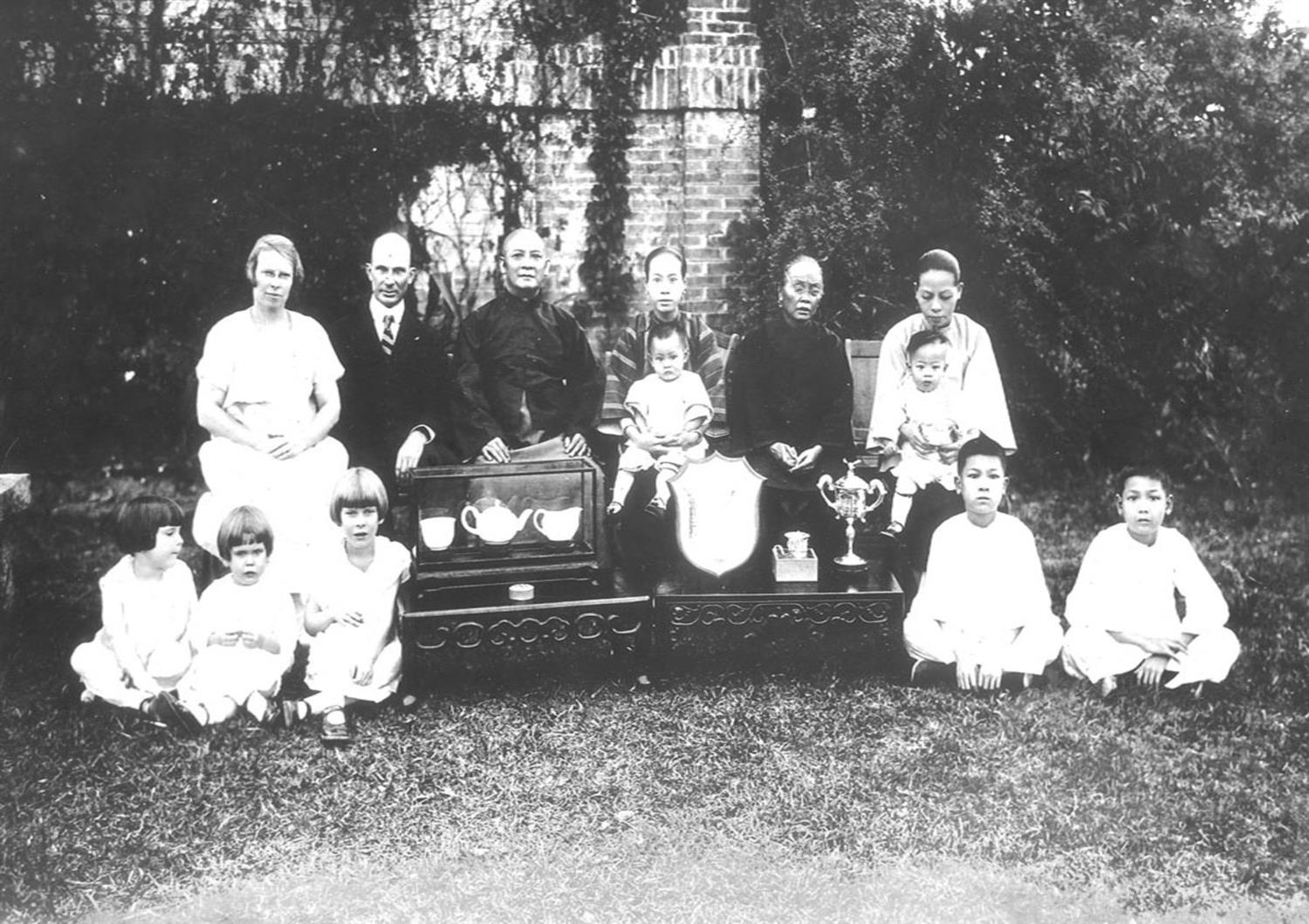 粵語: 嘉惠霖醫生同李福林兩家人